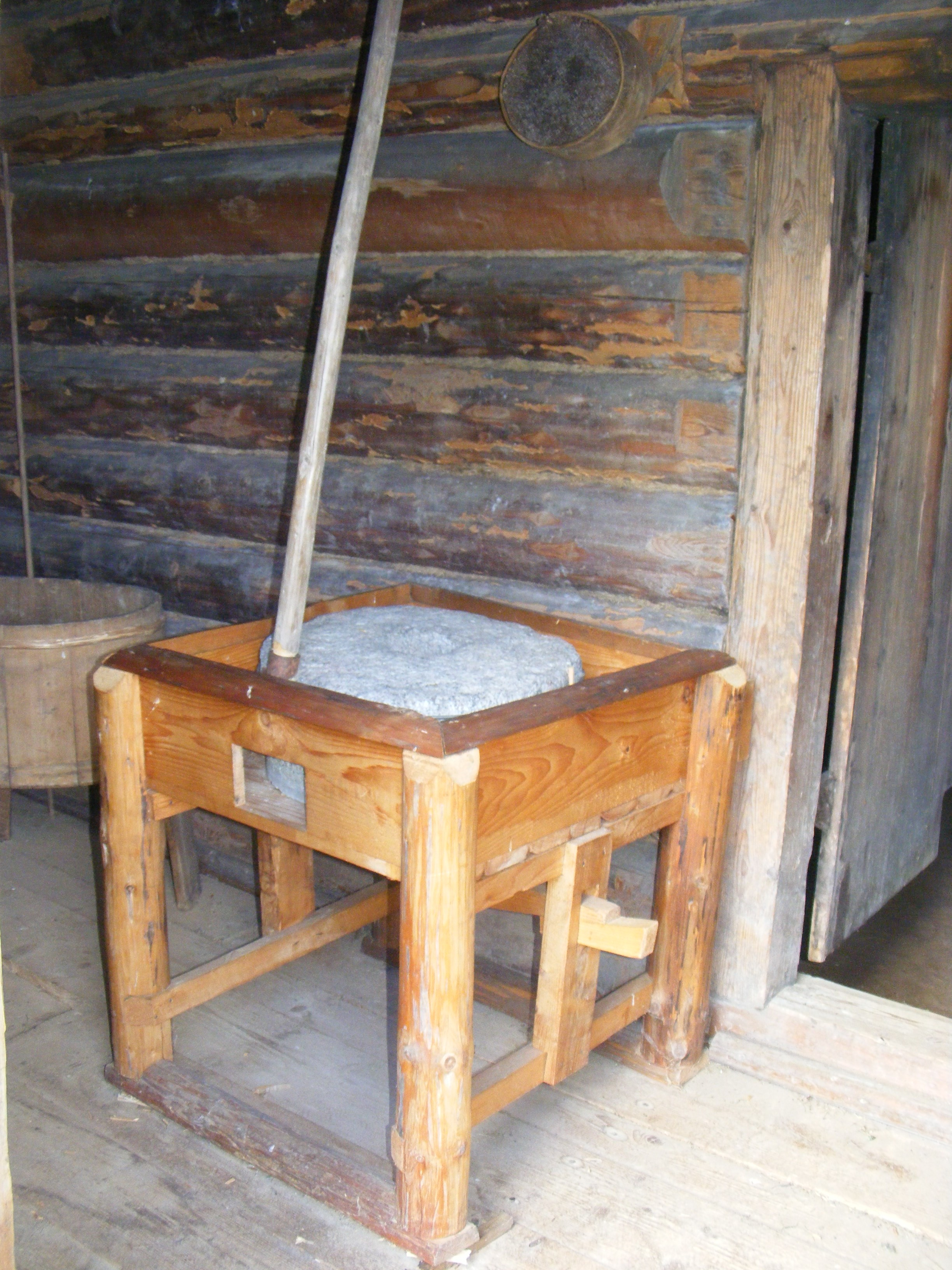 Töövalmis käsikivi XIX sajandi talus